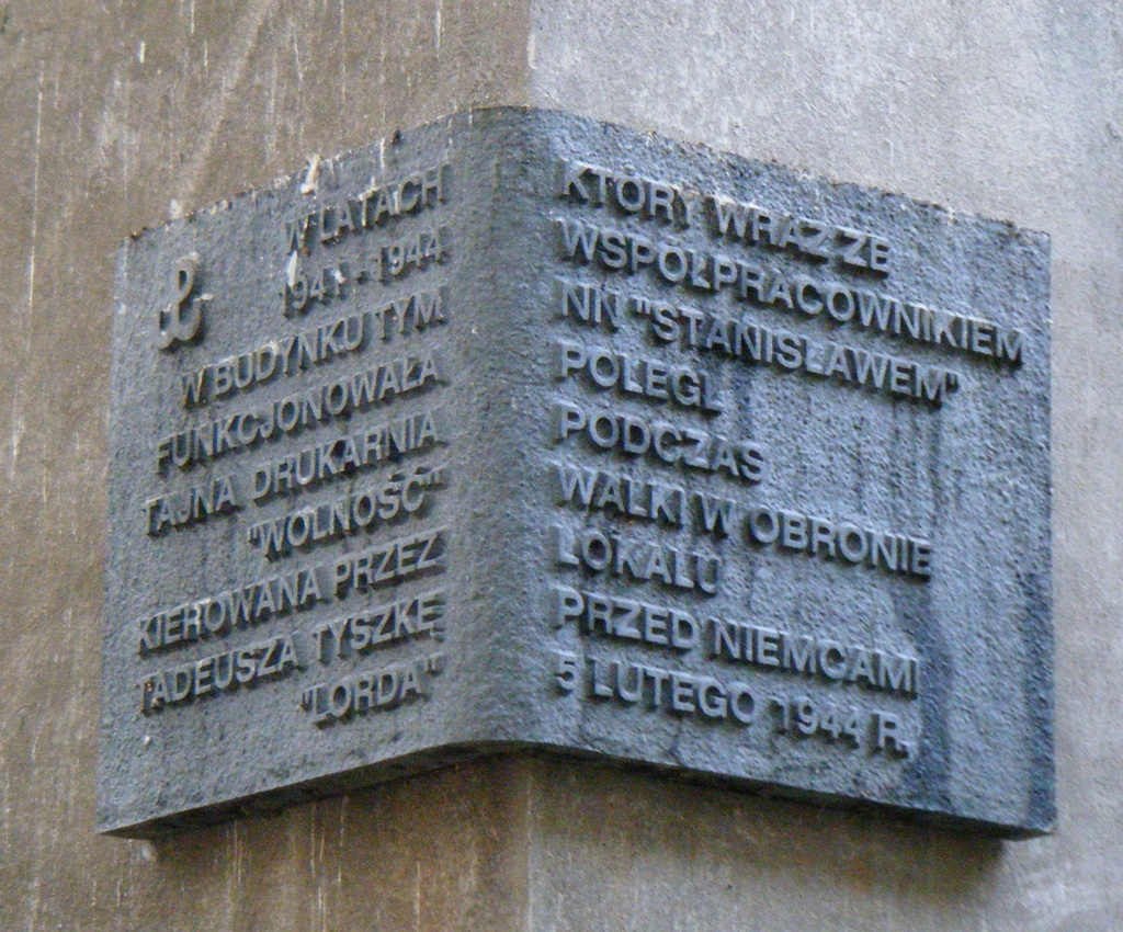 Tablica upamiętniająca tajną drukarnię "Wolność działającą w latach 1941-1944. Warszawa, Saska Kępa, ul. Lipska 26.